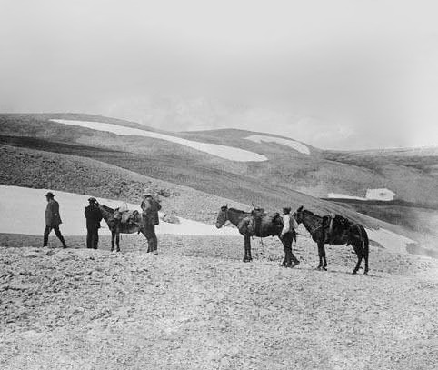 Imatge